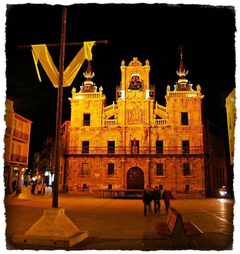 Plaza mayor durante la semana santa astorgana